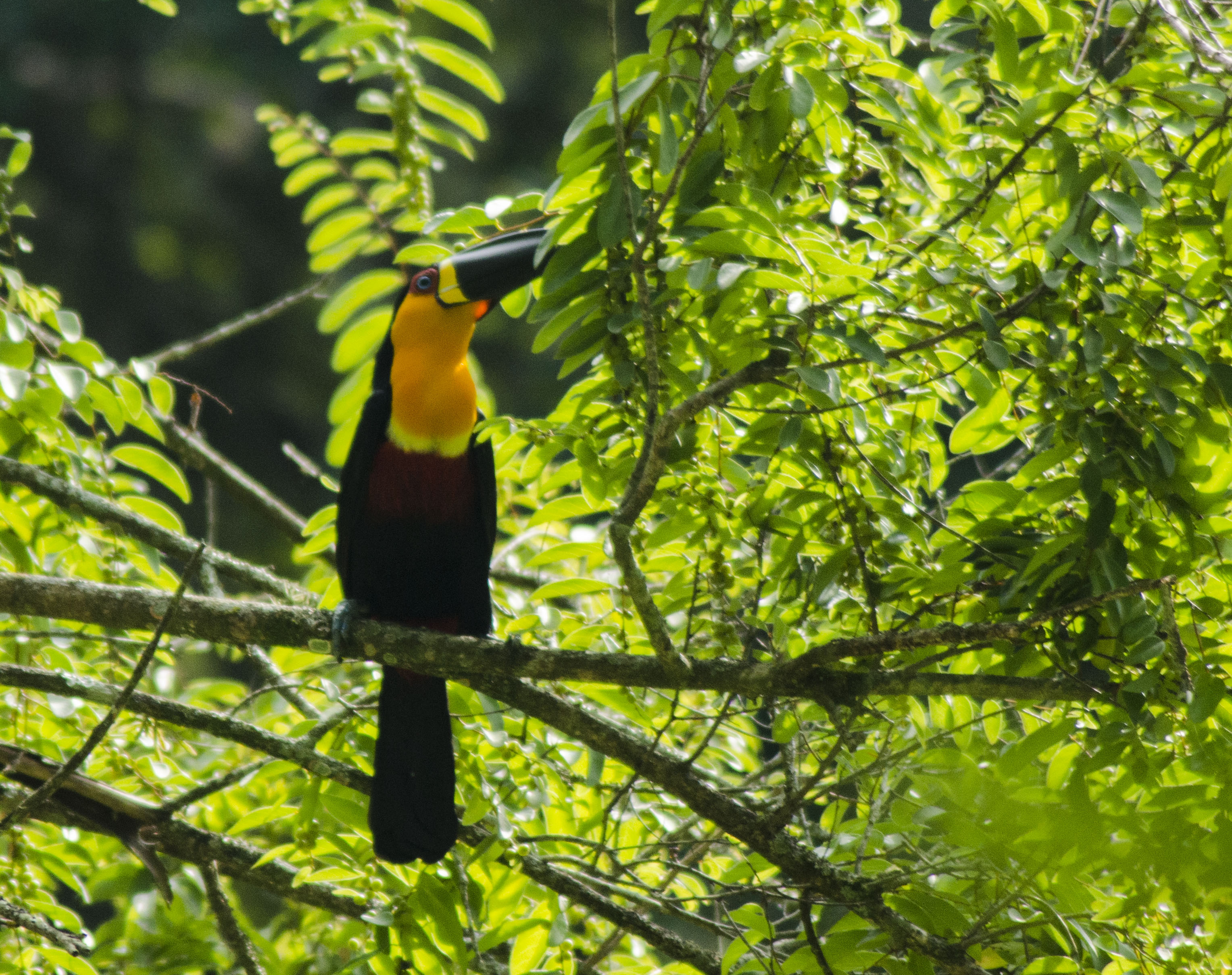 Tucano-de-bico-preto descansa em árvore no Jardim Botânico do Rio de Janeiro.